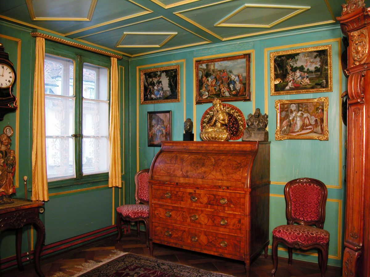 Wohnzimmer im Museum Haus zum Dolder, Beromünster/Luzern/Schweiz